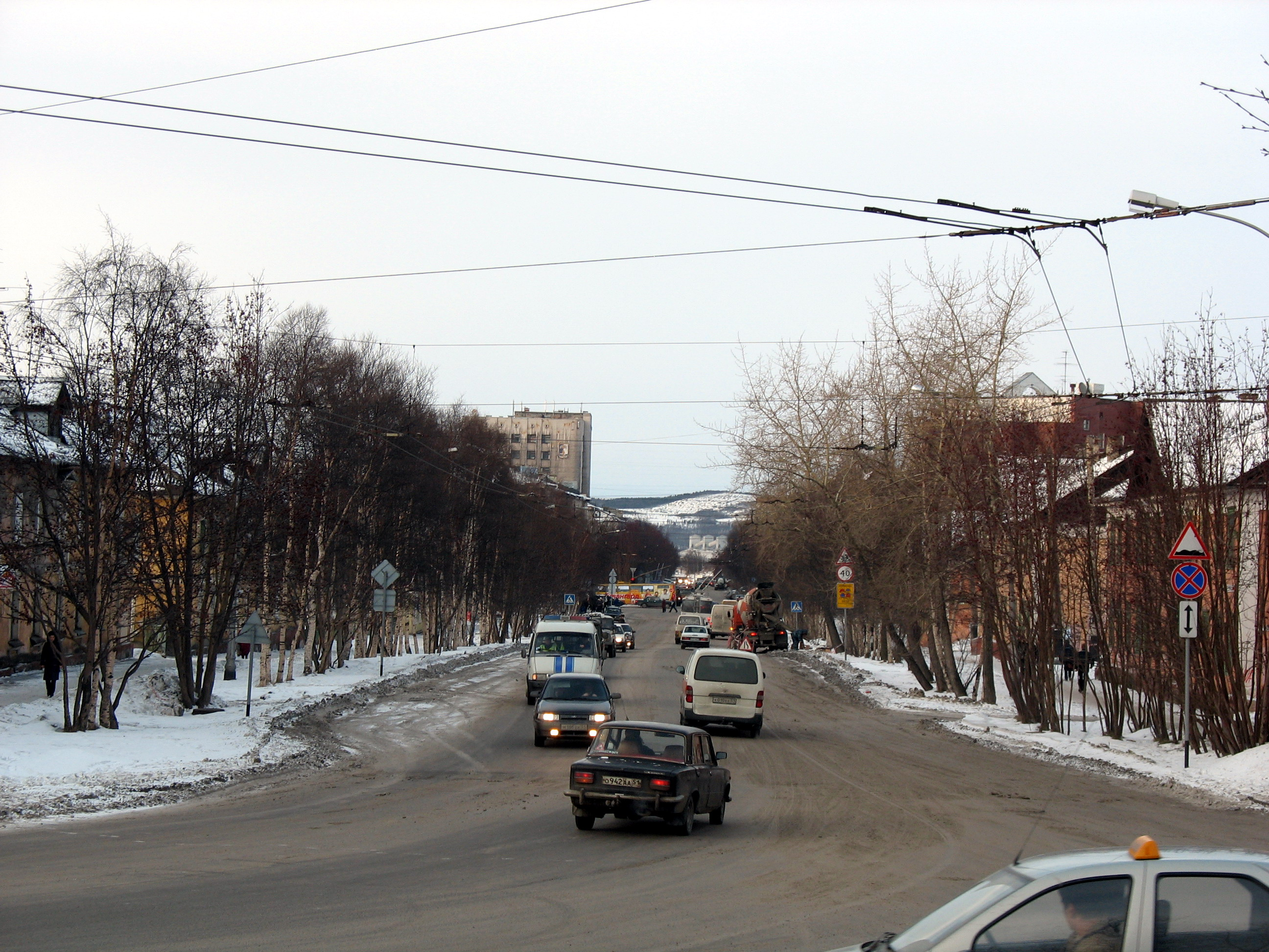 Ул. Карла Либкнехта